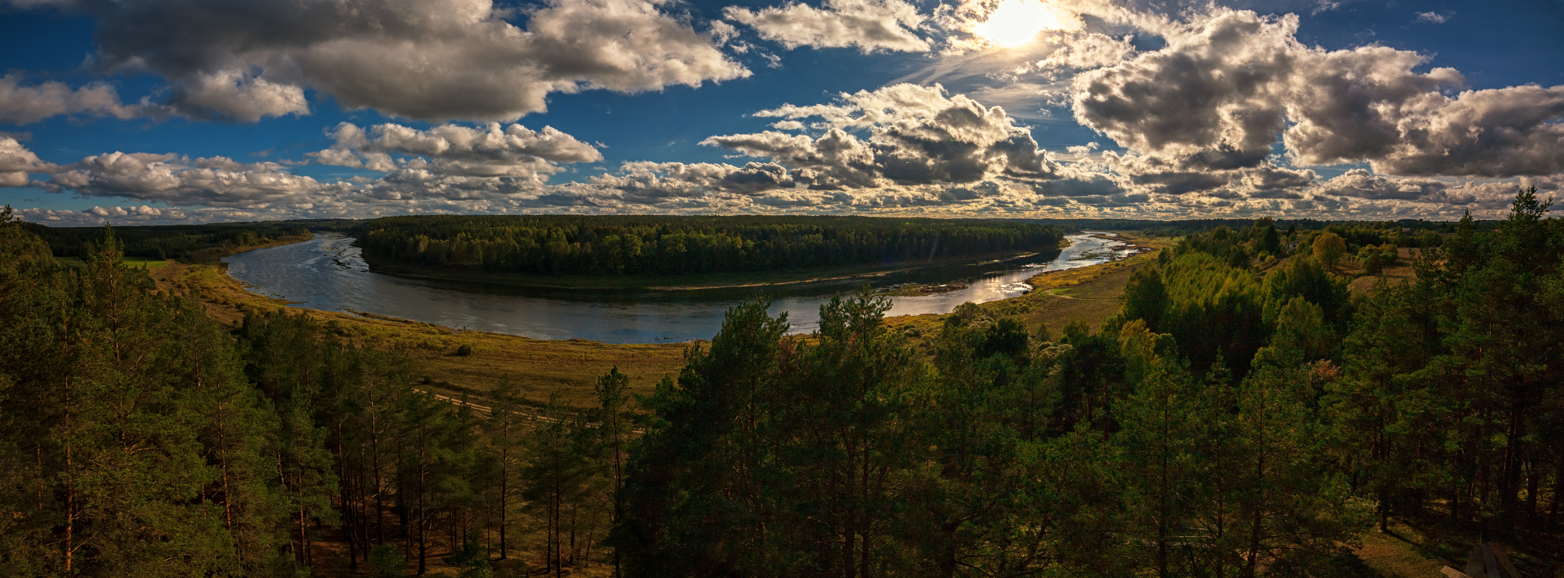 Uzkāpjot 24m augstajā skatu tornī, no putna lidojuma var aplūkot ainavas un gleznainos Daugavas lokus. Pa kreisi visā krāšņumā redzams Rozališķu loks. Savukārt pa labi paveras skats, kas attēlots uz 10 latu naudas zīmes. Ņemiet „desmitnieku” un brauciet salīdzināt! Vasargeliški, Naujenes pagasts, Daugavpils novads